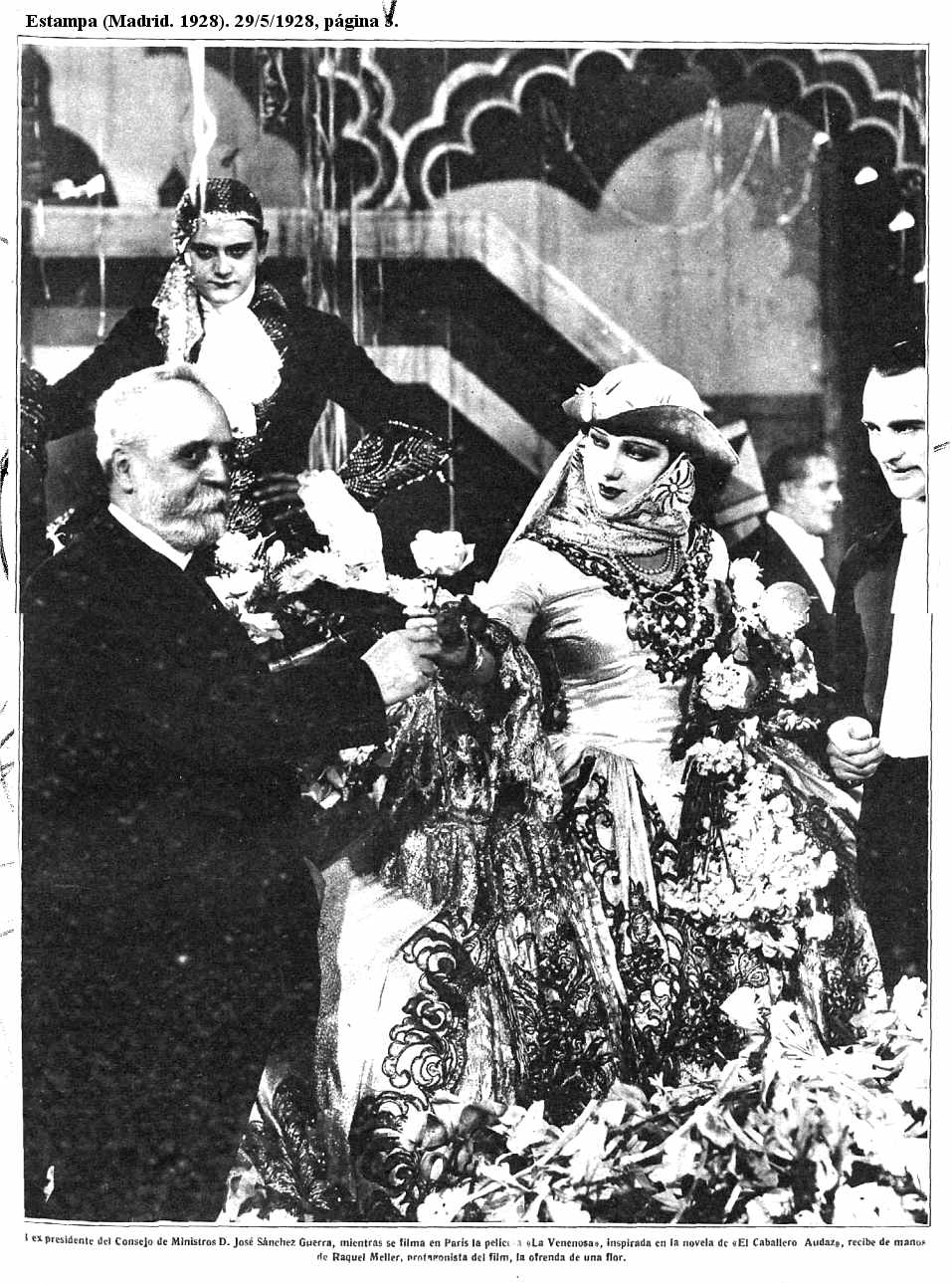 L,ex presidente del Consejo de Ministros D. Jose Sanchez Guerra, mientras se filma en Paris la pelicula “La Venenosa”, inspirada en la novela de “El Caballero Audaz”, recibe de mano de Raquel Meller, protagonista del film, la ofrenda de una flor.